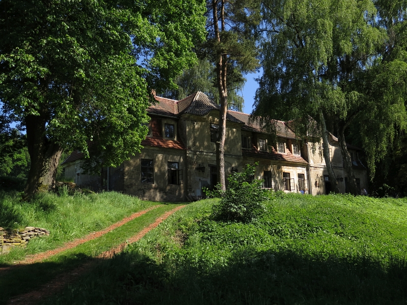 Zámeček Elbančice, Běleč 3, Běleč (okres Tábor).